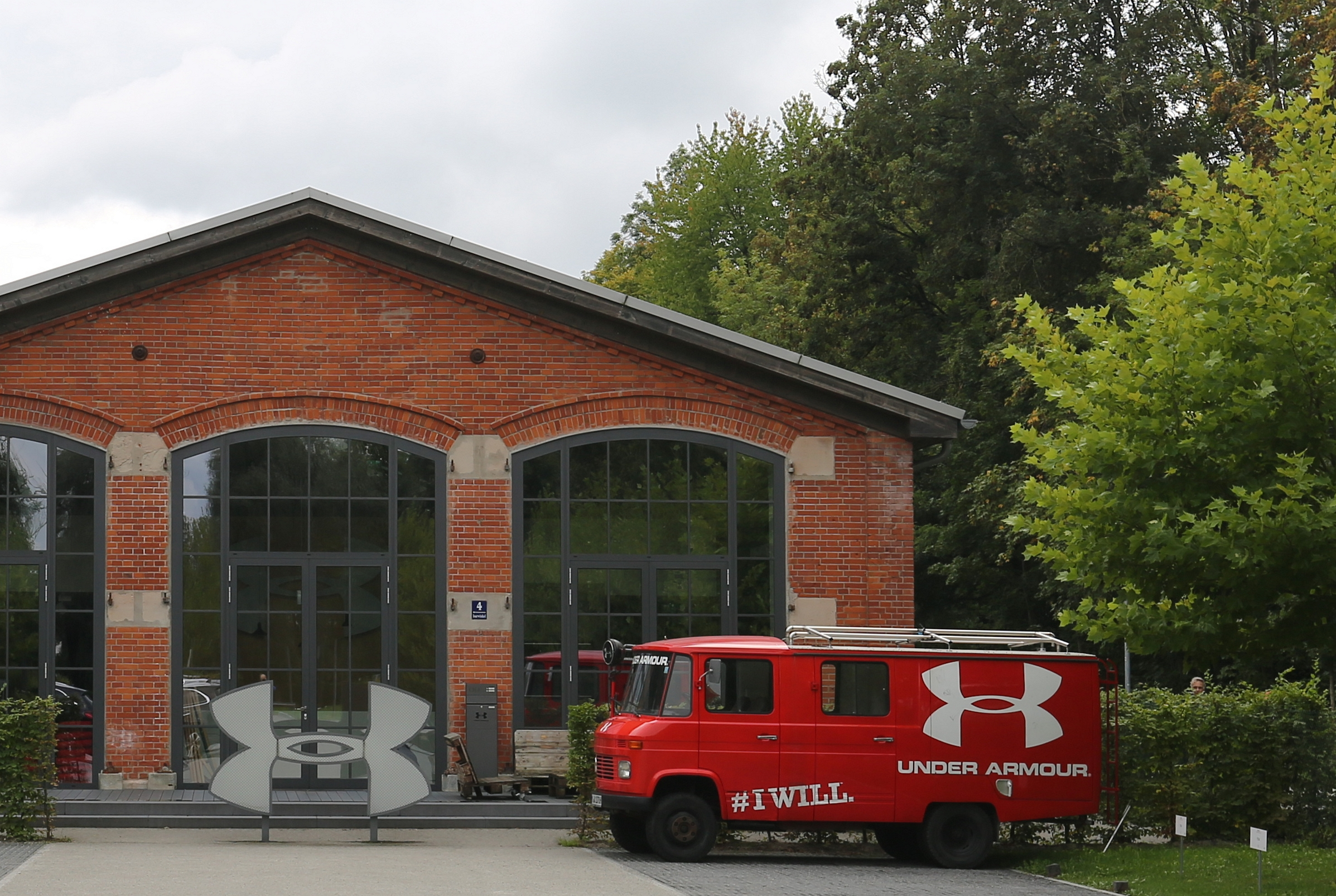 Under Armour Deutschland im renovierten Bahnbetriebswerk der Isartalbahn, München-Thalkirchen